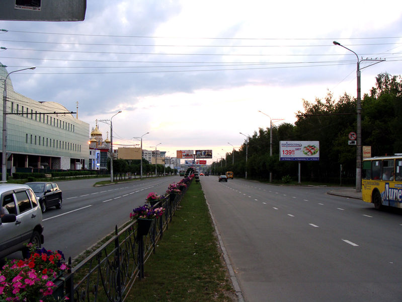 Улица Водопьянова (г. Липецк)